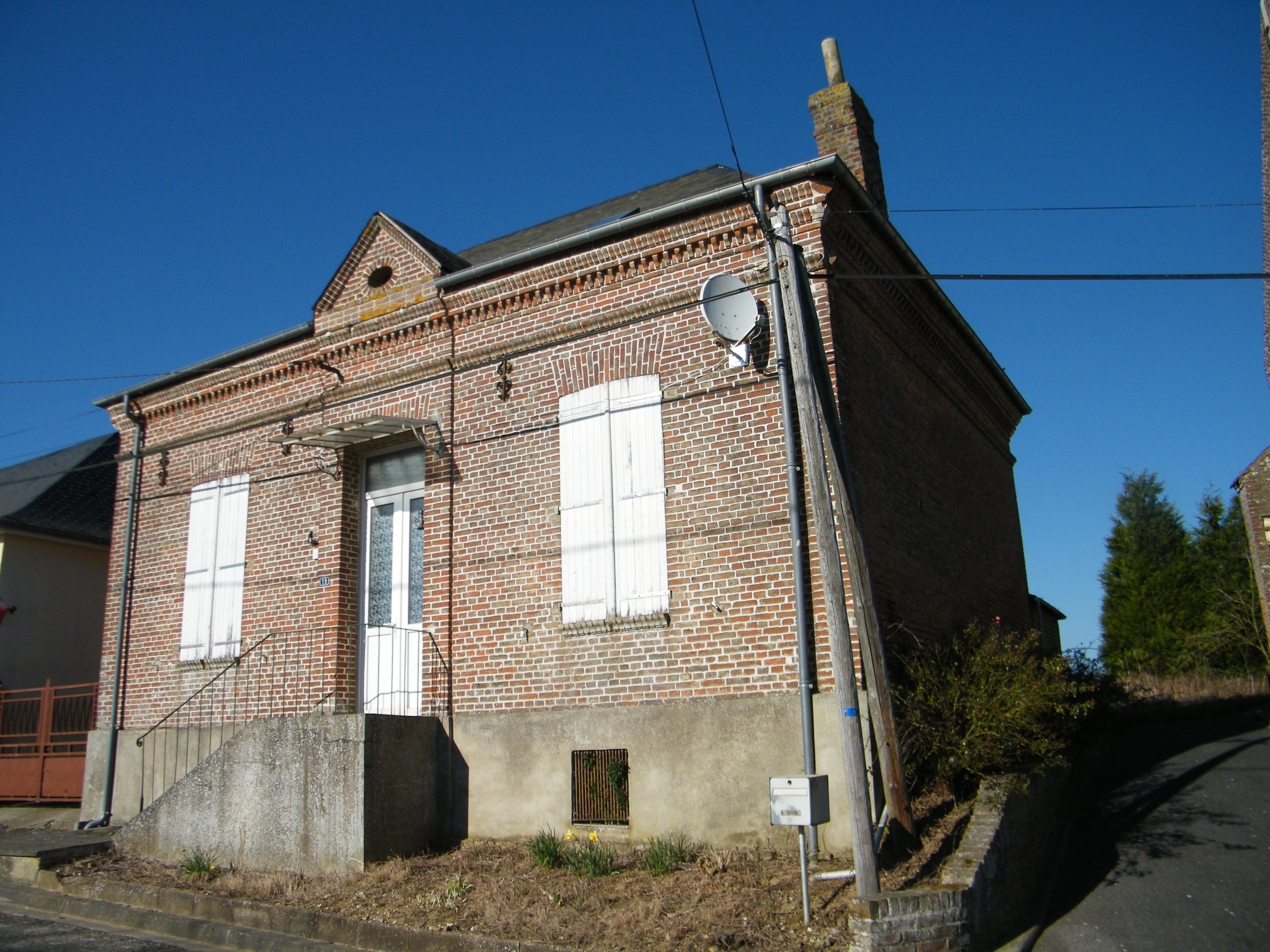 L'ancienne école de Frettecuisse.